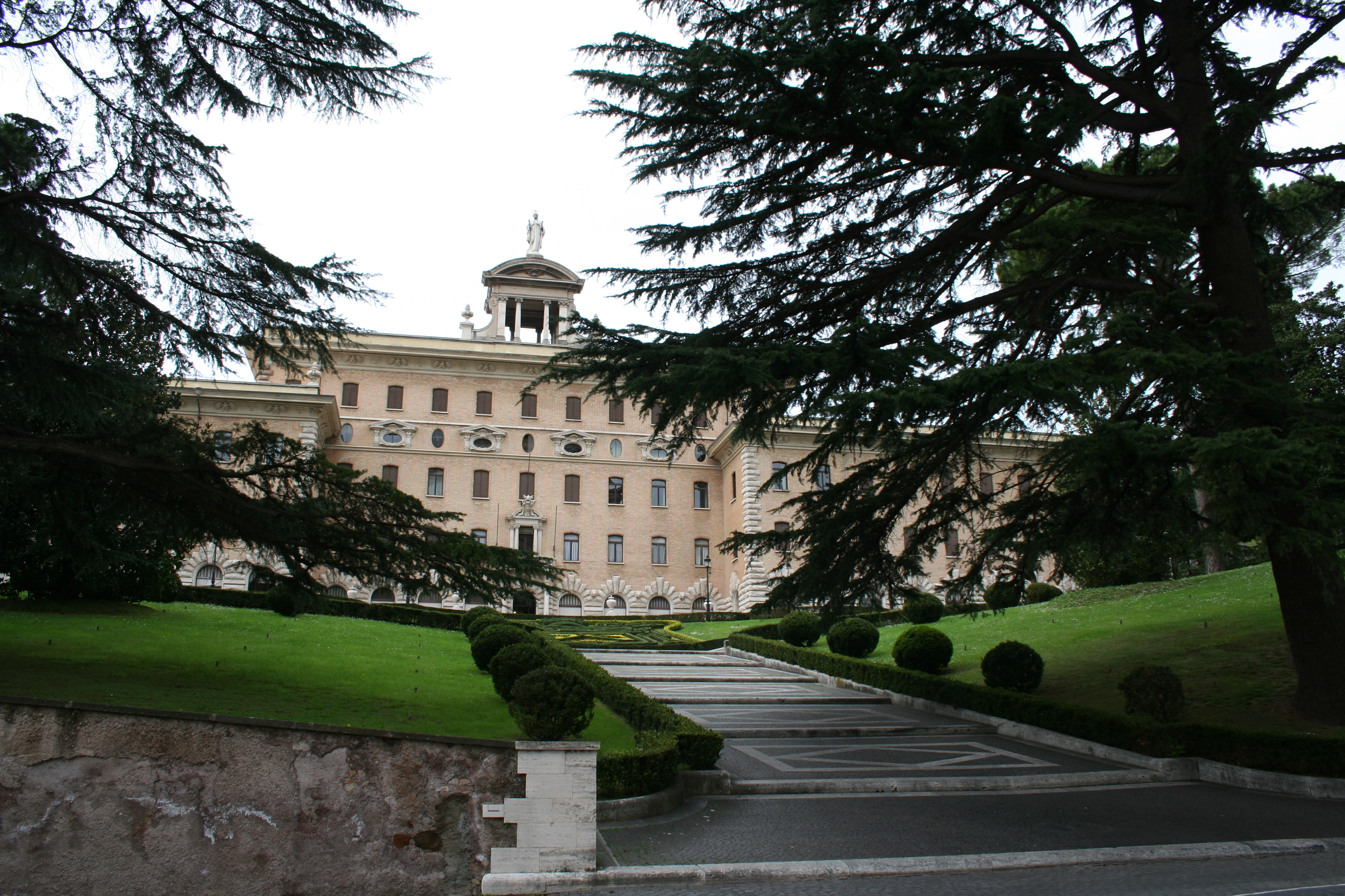 Sede del gobierno vaticano dentro del vaticano